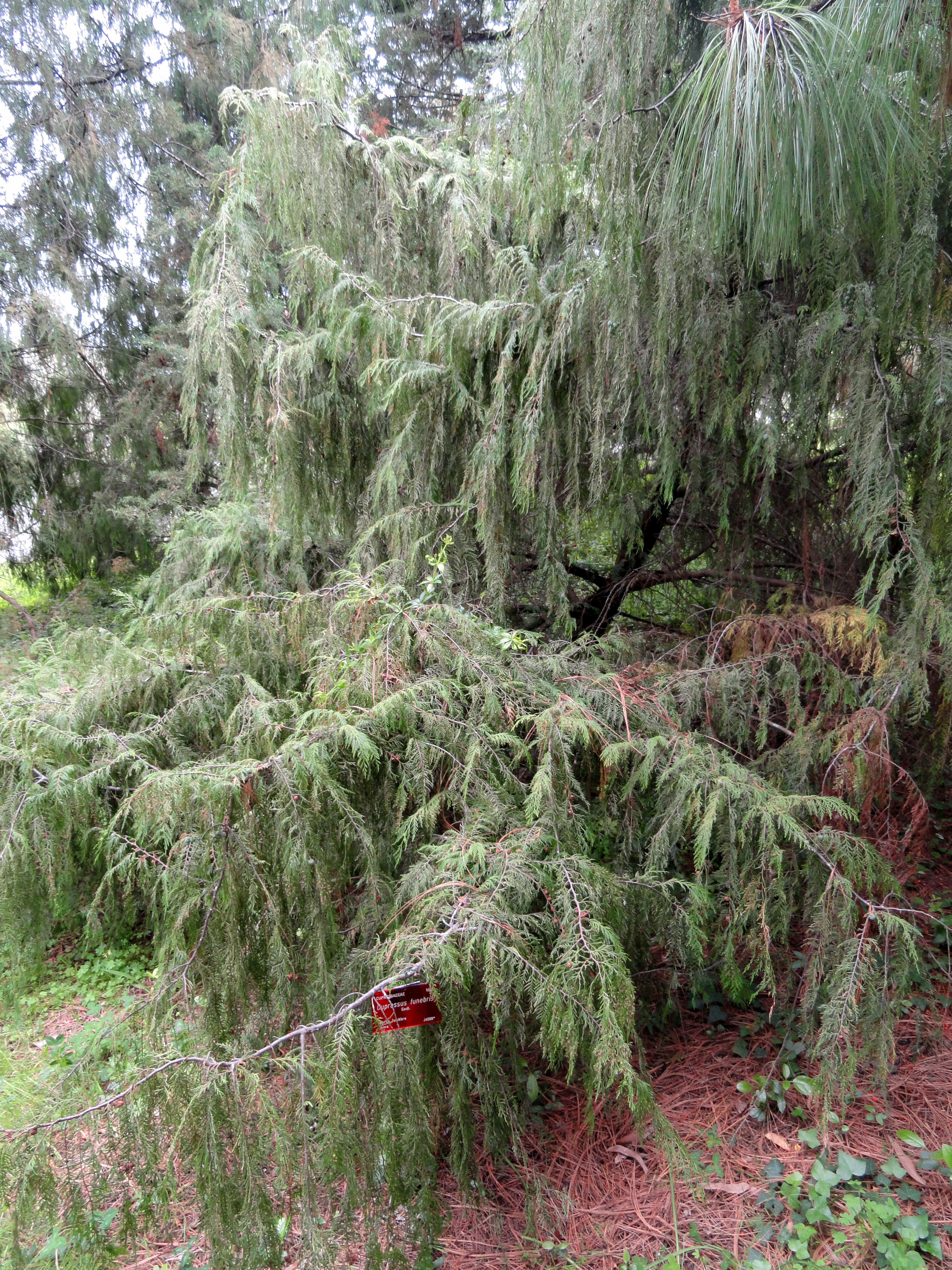 Cupressus funebris specimen in the Jardin botanique de la Villa Thuret, Antibes Juan-les-Pins, Alpes-Maritimes,France.